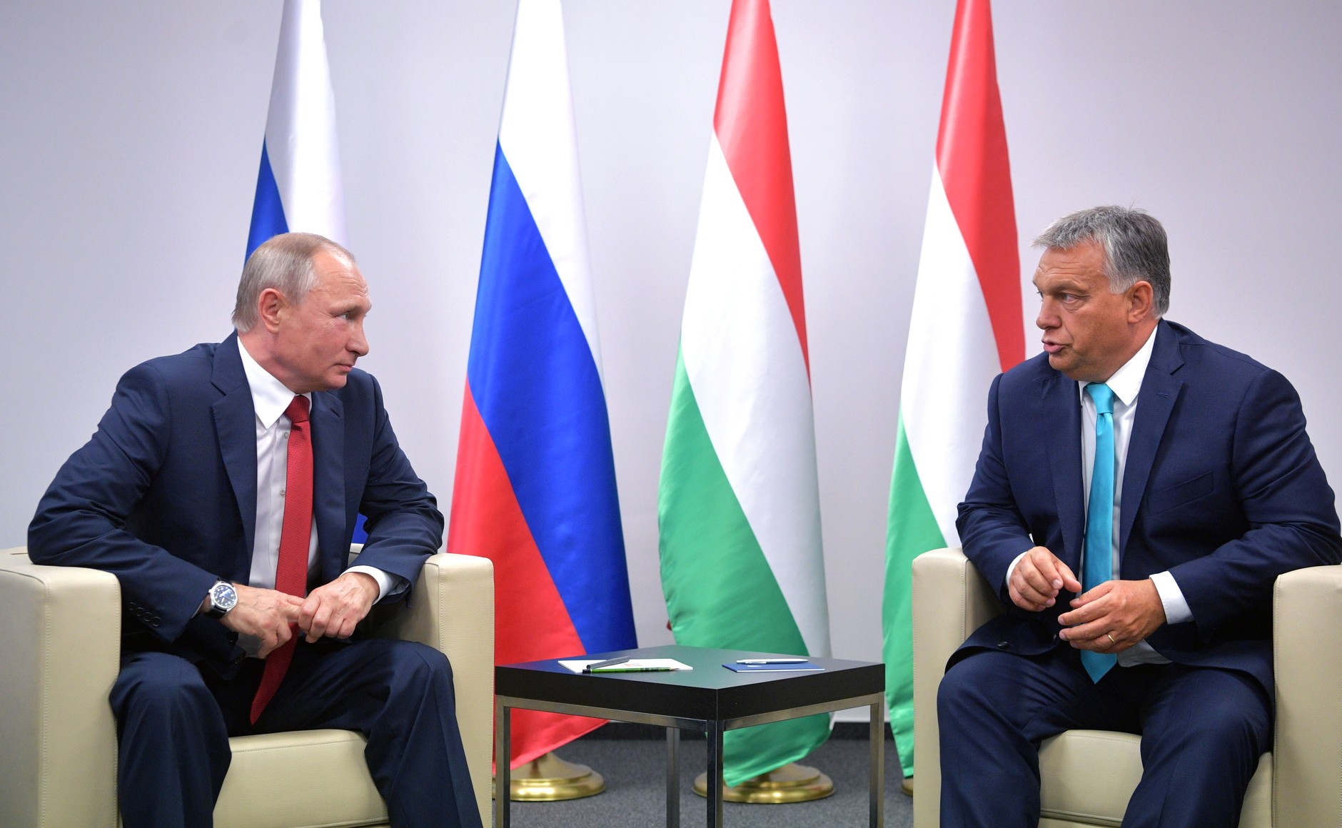 Встреча Президента России Владимира Путина с Премьер-министром Венгрии Виктором Орбаном